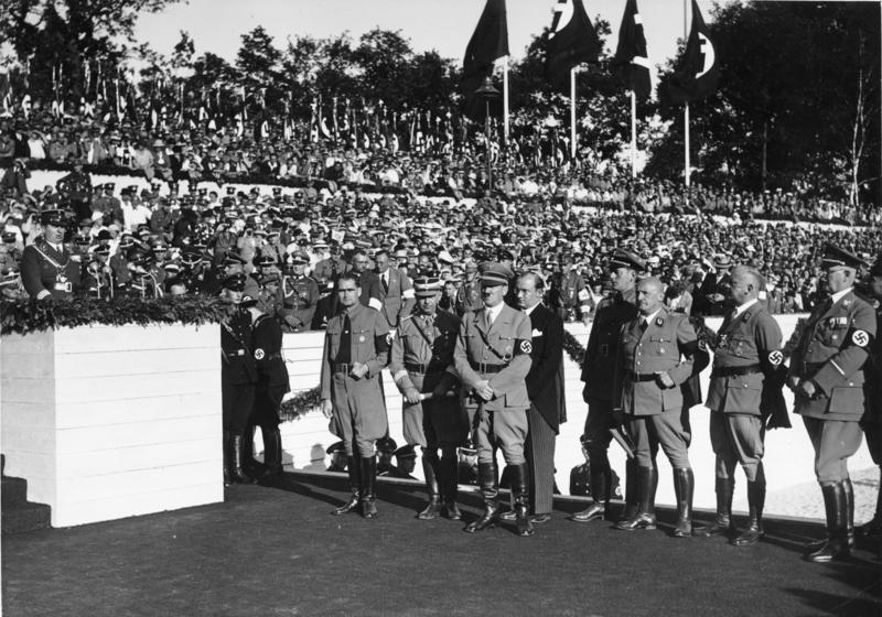 Nürnberg, Reichsparteitag, Grundstein Kongreßhalle Reichsparteitag 1935 in Nürnberg. Reichshandwerksmeister Schmidt in Zunfttracht bei der feierlichen Grundsteinlegung für die neue Kongresshalle. [Nürnberg.- Reichsparteitag der NSDAP, "Reichsparteitag der Freiheit", Reichshandwerksmeister Schmidt auf Rednerpult, daneben u.a. Rudolf Heß, Adolf Hitler, Julius Streicher, 10.-16. September 1935] Abgebildete Personen: Hitler, Adolf: Reichskanzler, Deutschland Heß, Rudolf: Stellvertreter Hitlers als Führer der NSDAP, Kanzleileiter, Deutschland (GND 11855039X) Streicher, Julius: Gauleiter Franken, MdR, Herausgeber Zeitschrift Der Stürmer, Deutschland (GND 118619233)